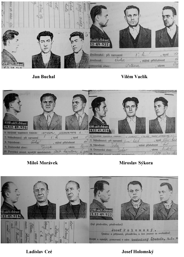 Fotografie osob ostravské ilegality ze spisů StB